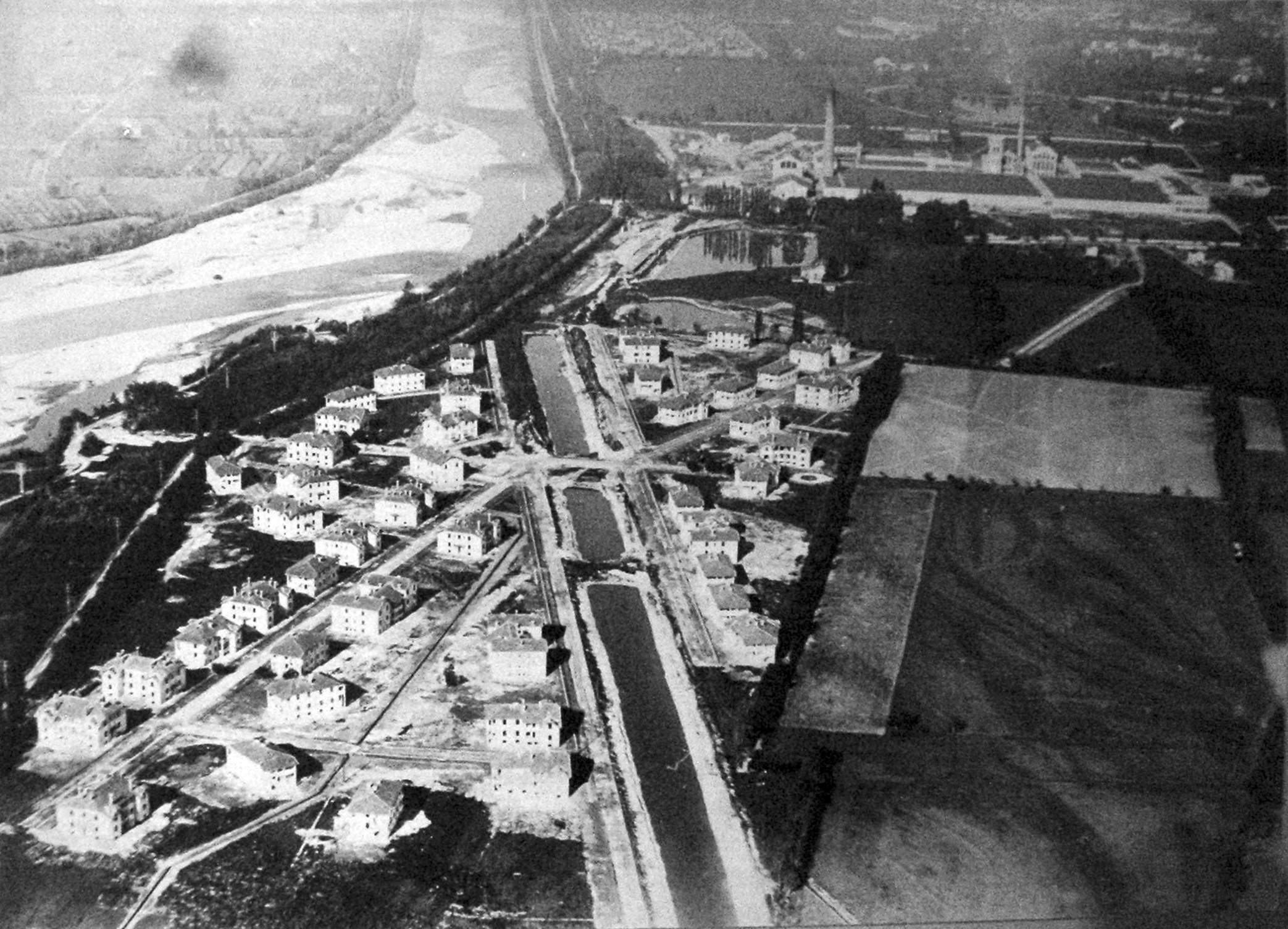 Cité de la viscose en 1927. Reproduction exposé au Musée de la viscose, Échirolles, Isère, France.